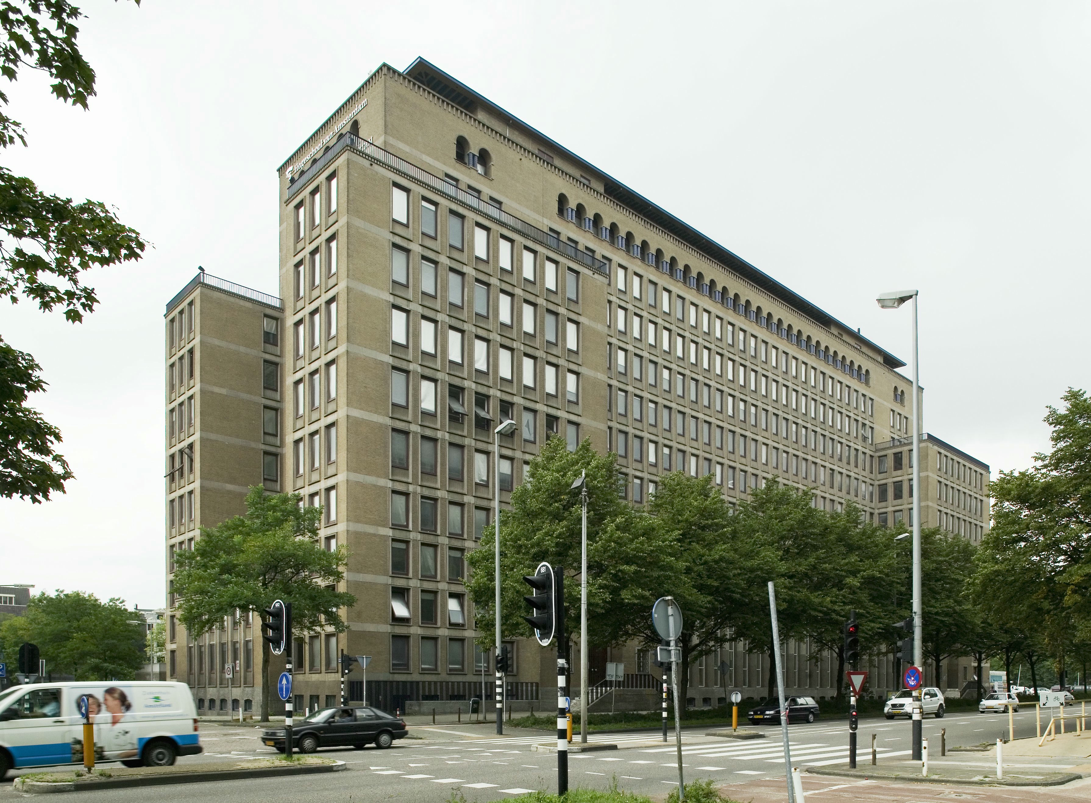 Belastingkantoor: Aanzicht vanuit het zuidoosten (opmerking: Gefotografeerd voor Monumenten van Herrezen Nederland, bladzijde 28)